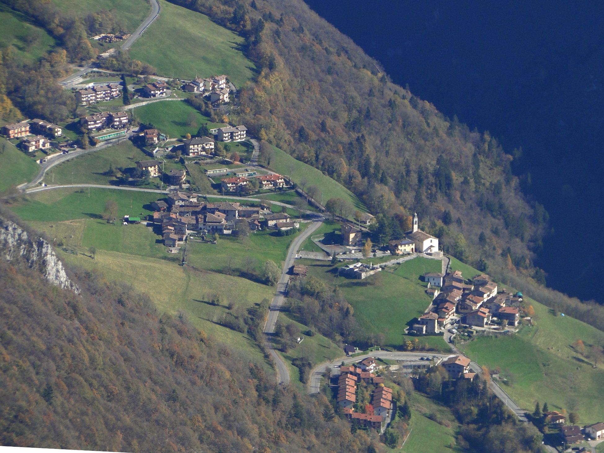 Nasolino, frazione di Oltressenda Alta, valle Seriana (BG)